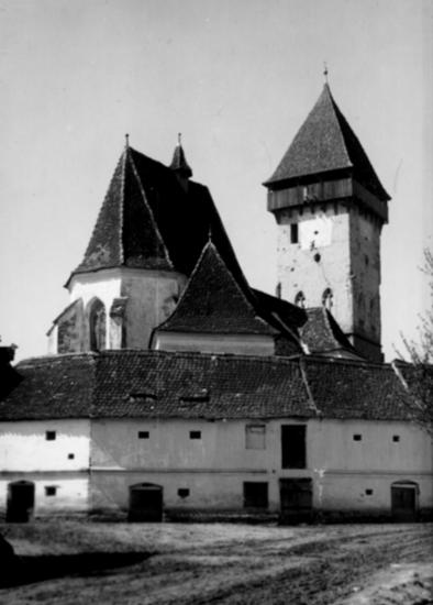 Ecel - Aţel